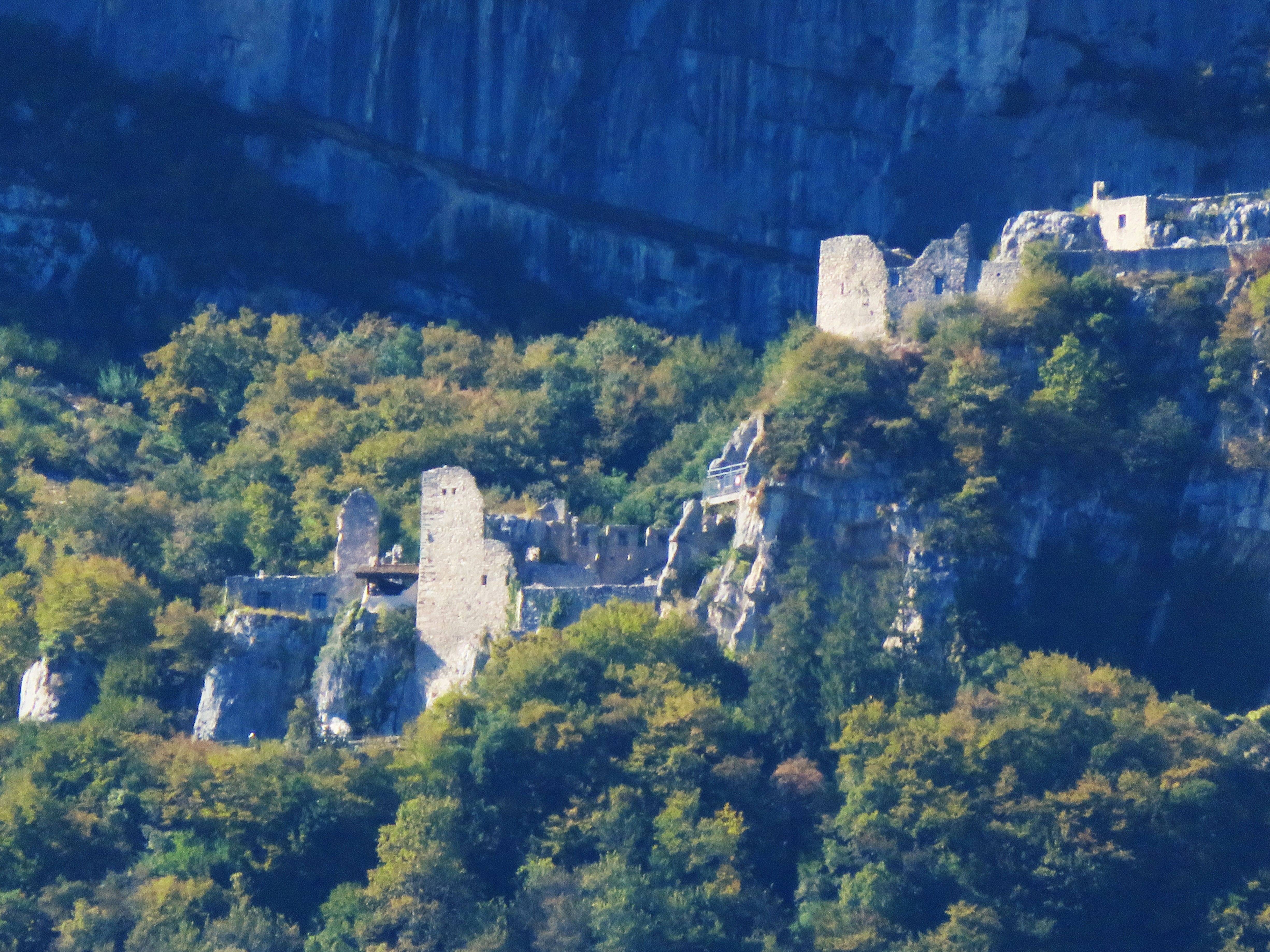 Castel Corno visto dalla valle, in basso, da Rovereto. Forse è l'ora migliore per la foto, con la giusta luce che evidenzia come il corno roccioso sia staccato dal resto del corpo del monte Biaena